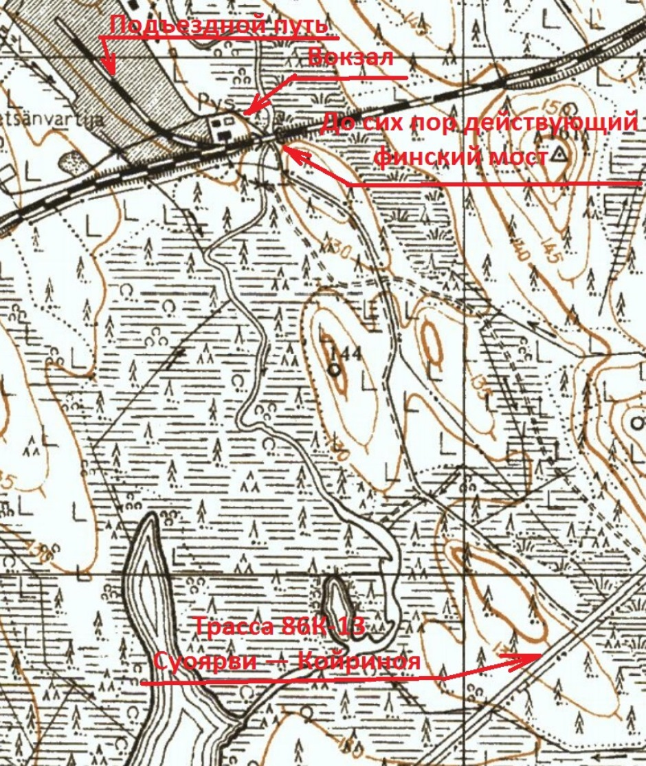 Каартойоки